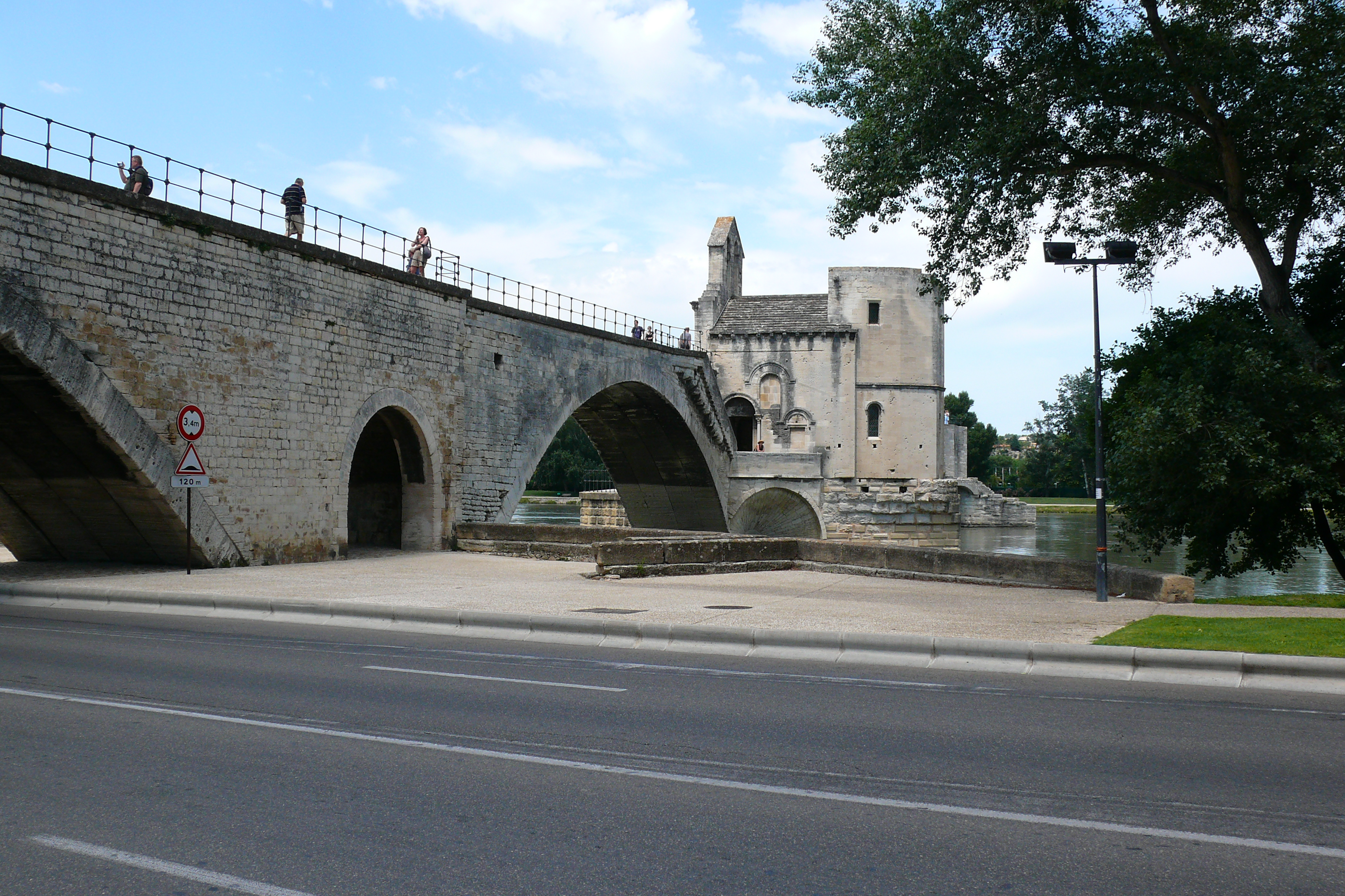 Die Brücke Pont St.Benezet in Avignon